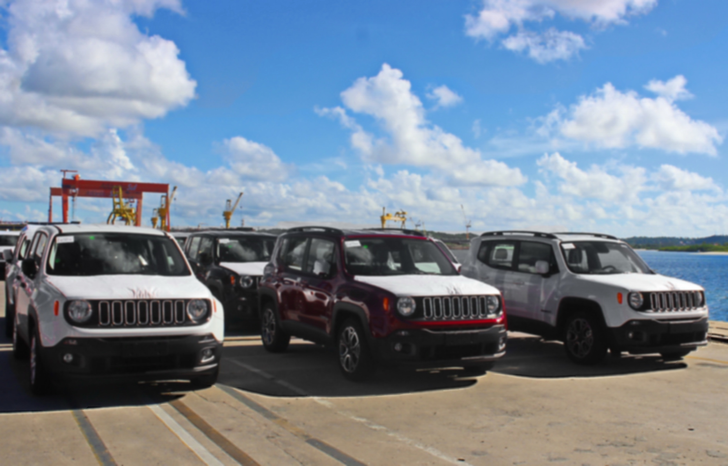 Foto: Priscila D'arc